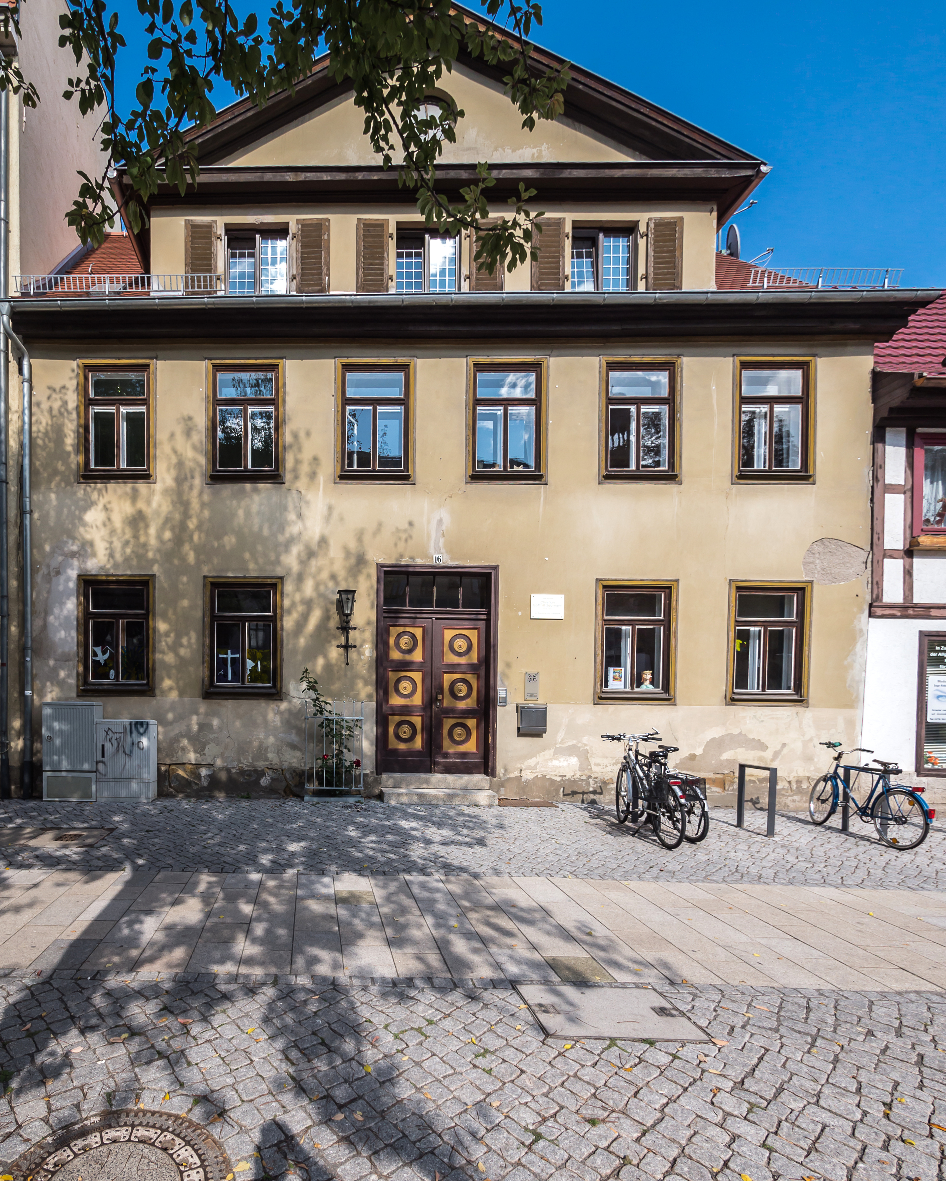 Erfurt-Altstadt Keller Andreasstraße 16